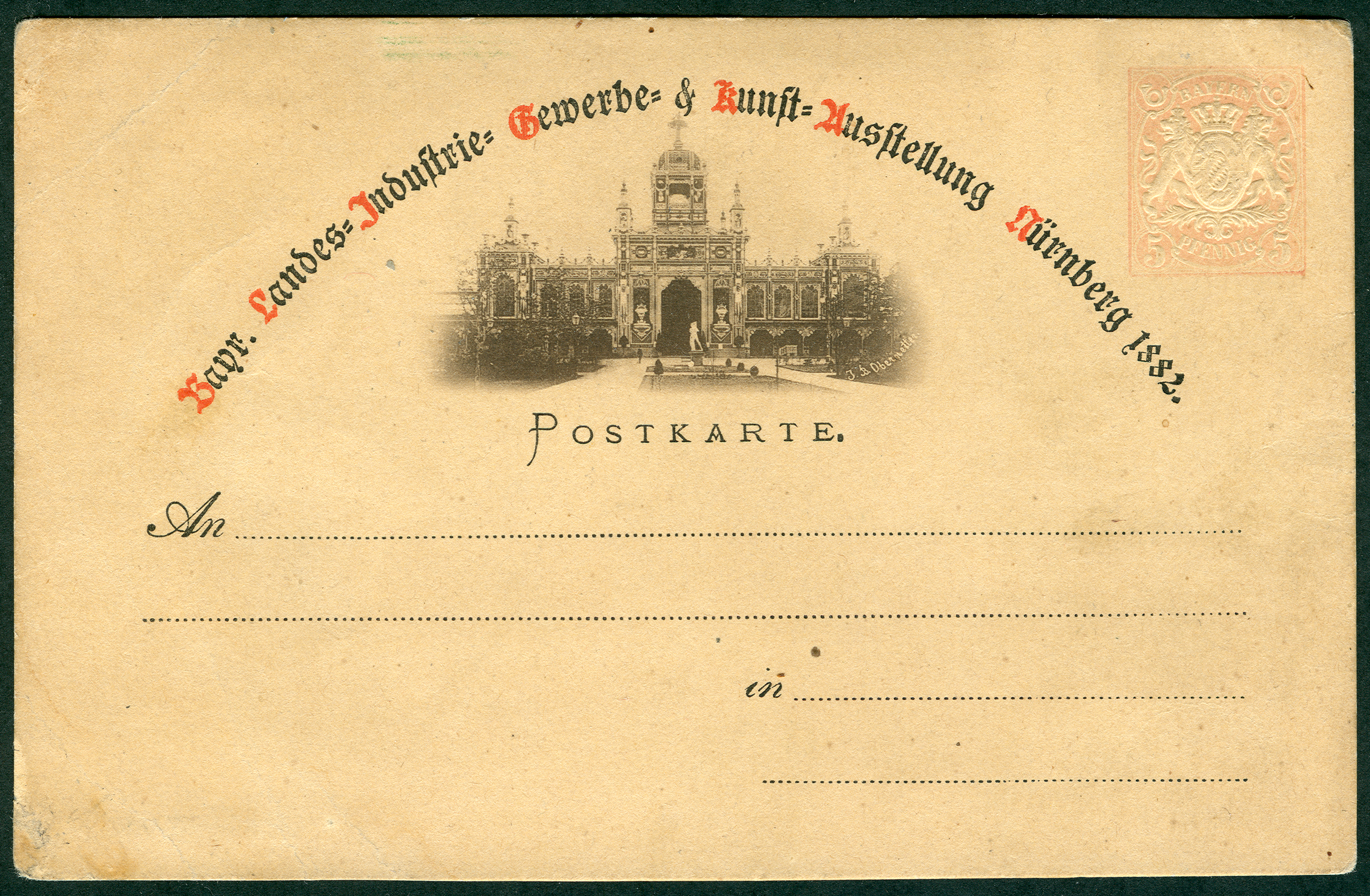 Eine der ersten Bild-Postkarten überhaupt, hier mit einem Foto als Lichtdruck von J. B. Obernetter von 1882 aus Nürnberg von der ersten Bayerischen Landesausstellung (andere Namen: Bayerische Landes-Industrie-, Gewerbe- und Kunst-Ausstellung, Bayrische Landes-Industrie-, Gewerbe- und Kunst-Ausstellung; Bayrische Landes-Ausstellung; Landes-Industrie-, Gewerbe- und Kunst-Ausstellung; Landes-Industrie-, Gewerbe- und Kunst-Ausstellung; Erste Landes-Industrie-, Gewerbe- und Kunst-Ausstellung). Die Ansichtskarte enthält den Vordruck einer rötlichen bayerische Briefmarke zu 5 Pfennig, der Druck der Marke ist von hinten (blanco) nach vorne erhaben. Die Rückseite der Karte ist blanco ...